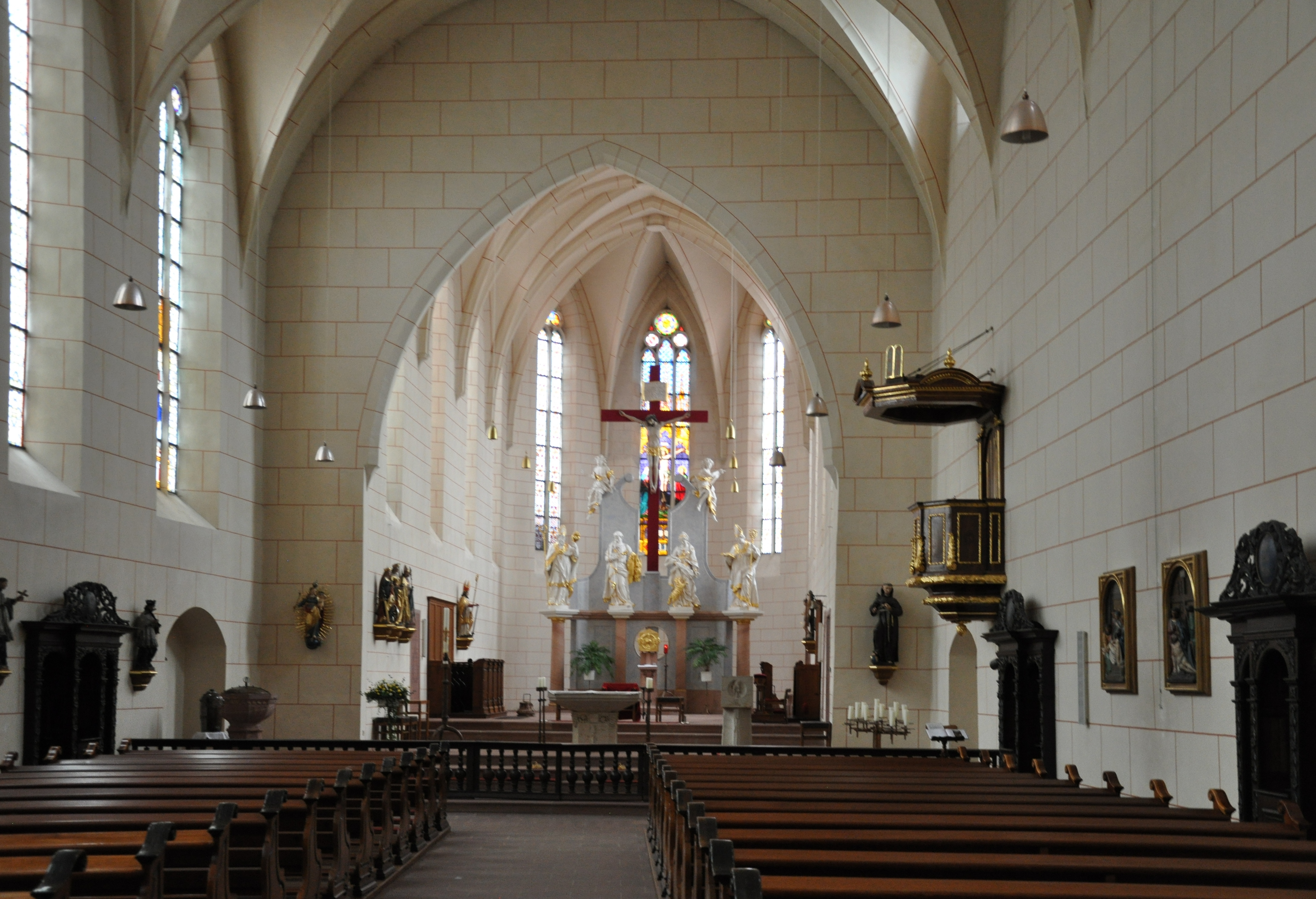 Oppenheim, Katholische Pfarrkirche St. Bartholomäus, Innenansicht